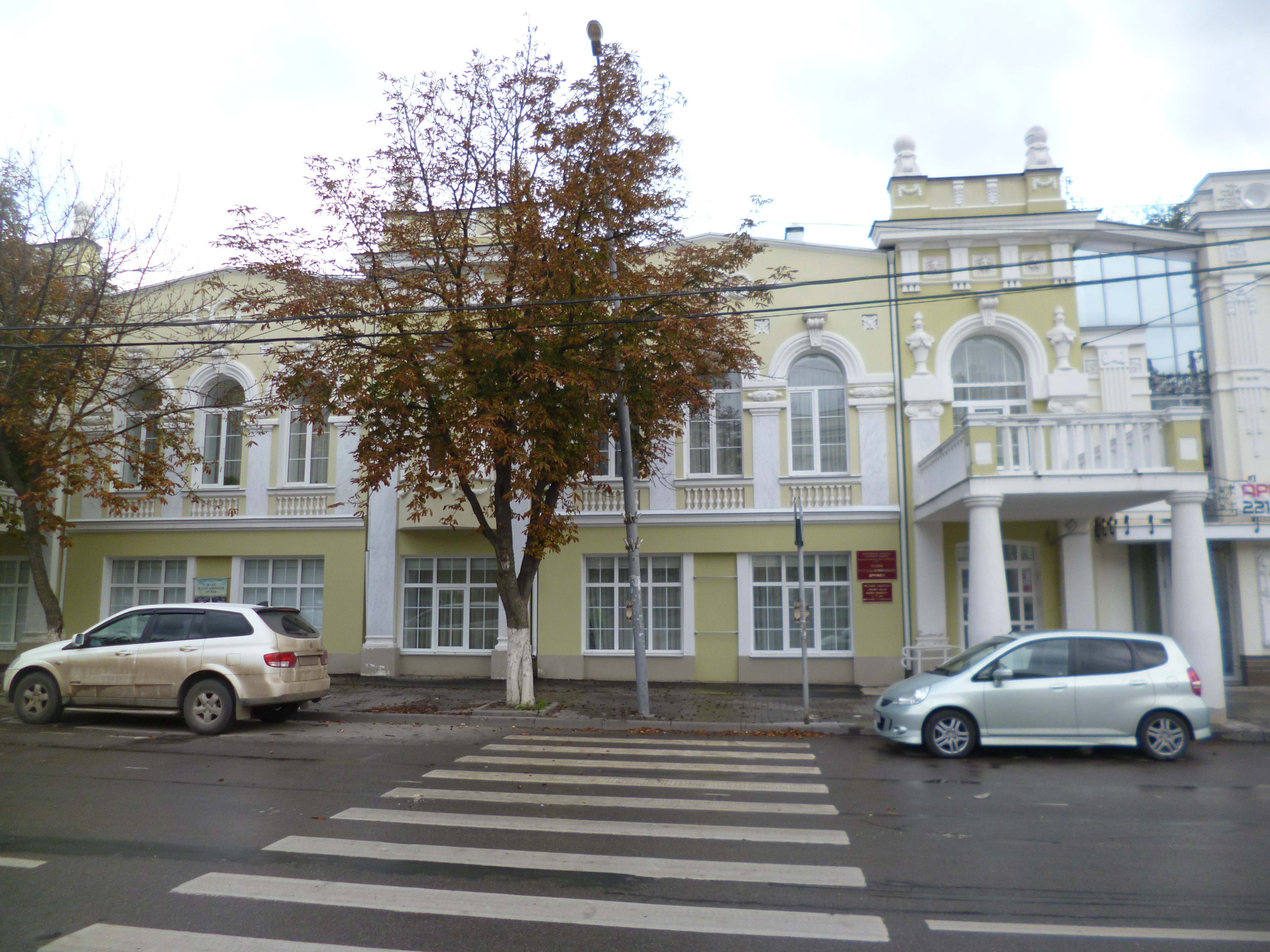 Дом искидарова (Ростовская область, Ростов-на-Дону, свободы площадь, 14) Построен в конце 19 века по проекту архитектора Ласканова С.К. В настоящее время здесь располагается музей Русско-Армянской дружбы